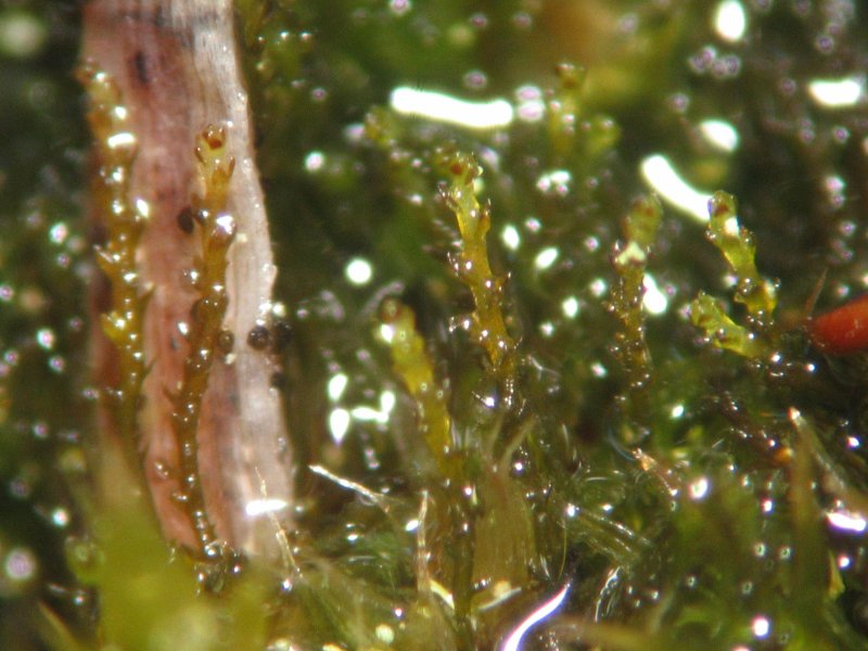 Spreizblättriges Kleinkopfsprossmoos (Cephaloziella divaricata)